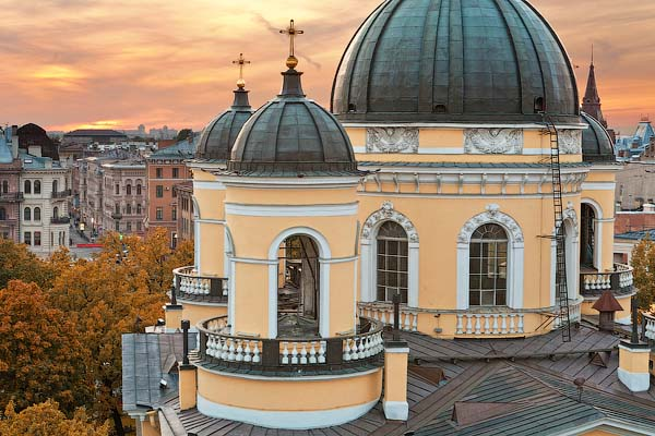 Использование произведения разрешается только при условии указания ссылки на блог автора